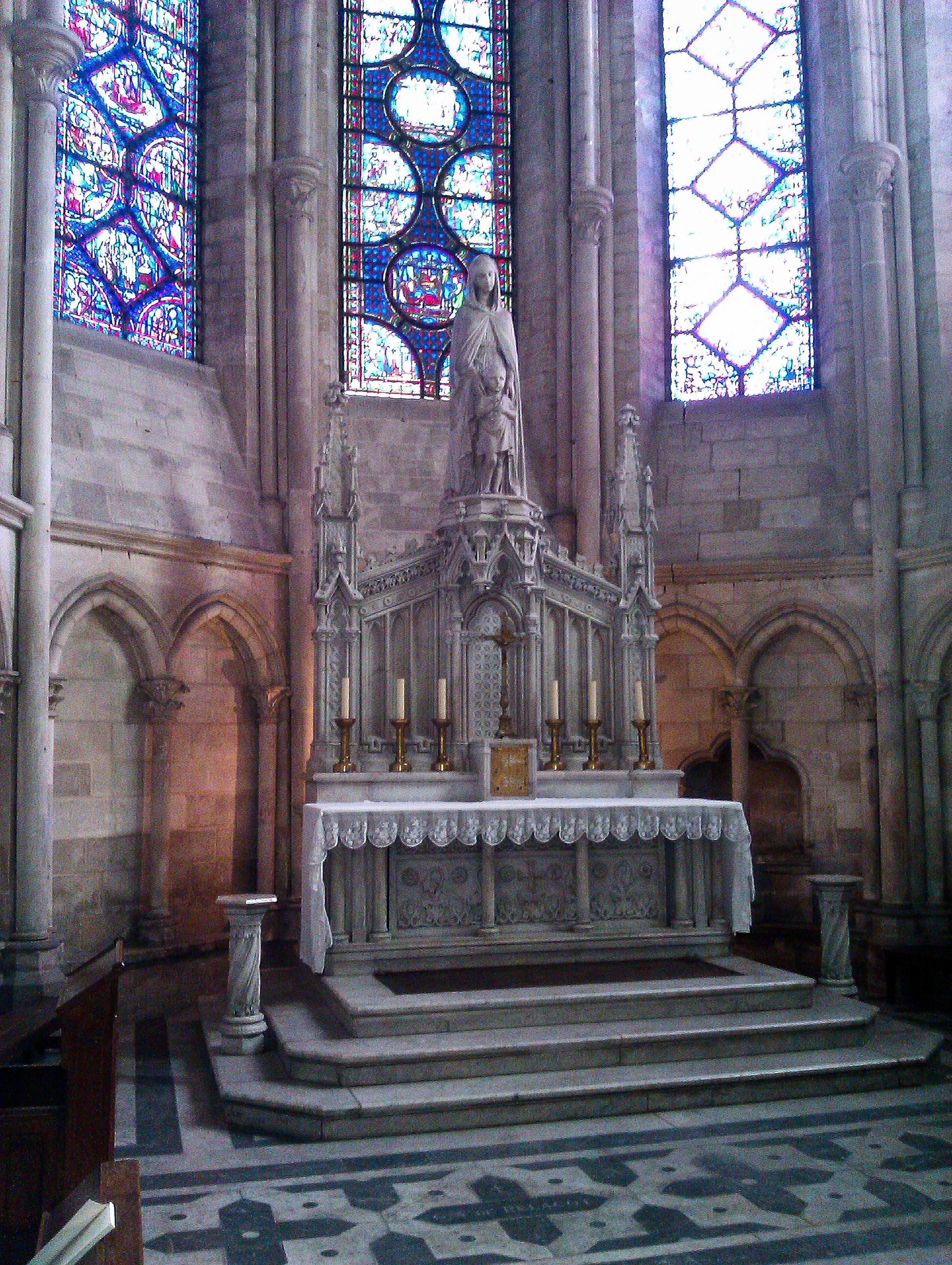 Chapelles absidiales de la Cathédrale Saint-Pierre-et-Saint-Paul de Troyes